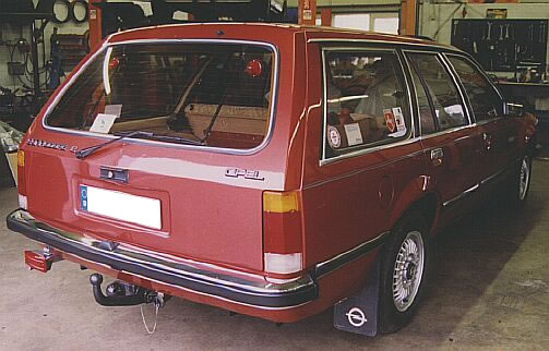 Opel Commodore 2,5E Voyage mit nachgerüsteten zusätzlichen Bremsleuchten und nachgerüsteter Nebelschlussleuchte